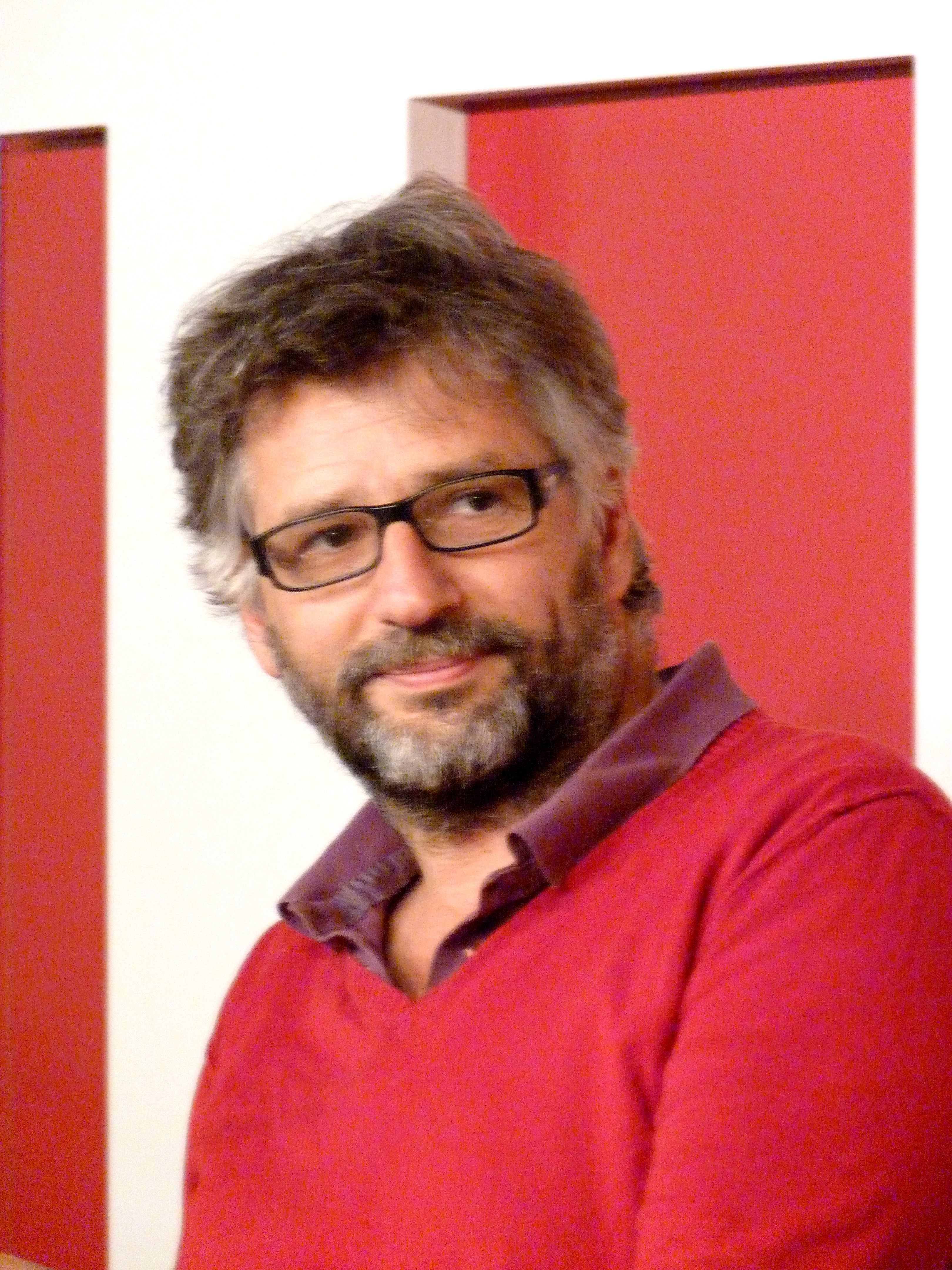 Michel Leclerc, le 14 avril 2011 lors de la présentation du DVD de son film "Le Nom des gens" à la FNAC Montparnasse, Paris (6e arrond.).